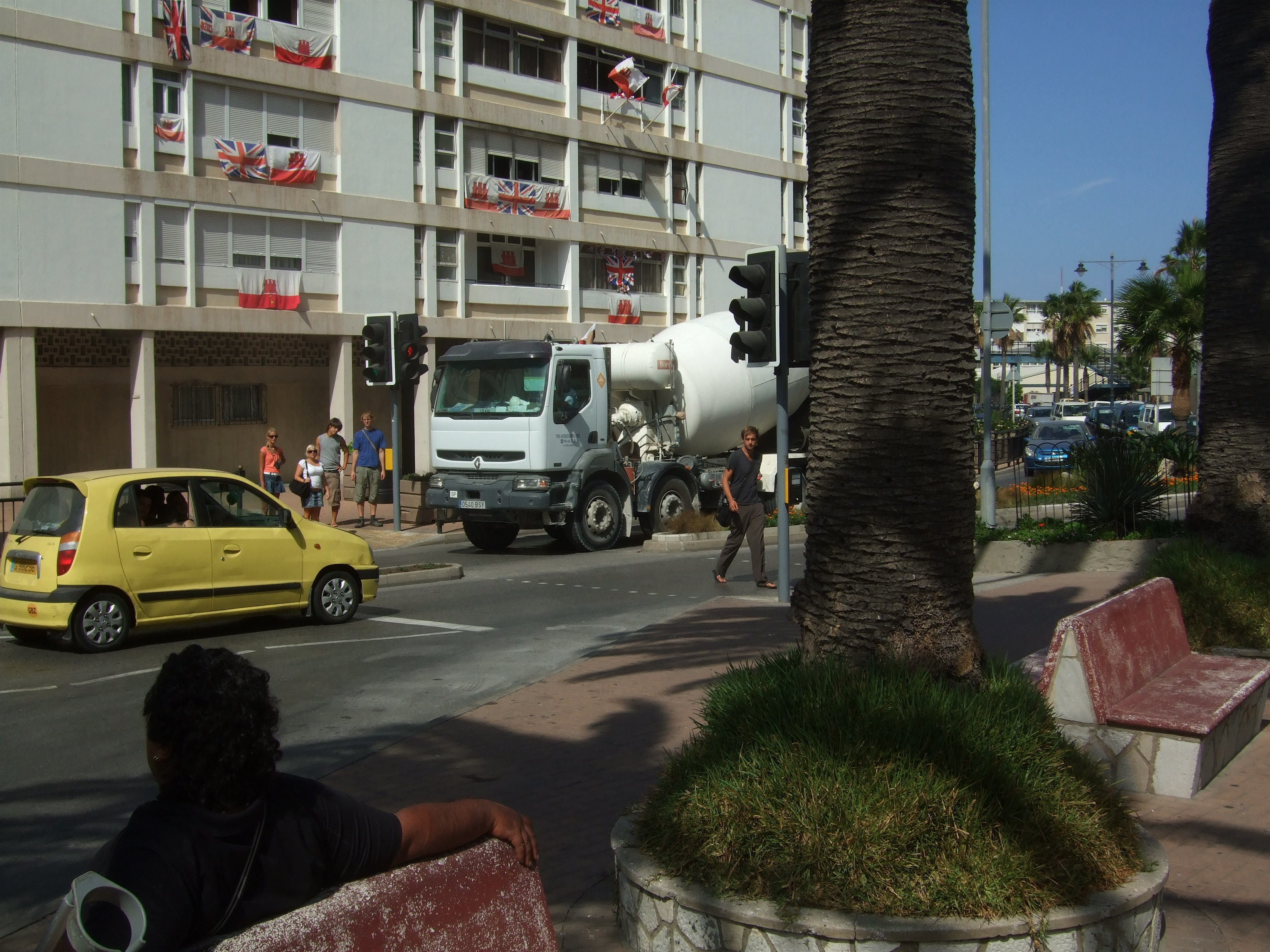 Glacis Road, Gibraltar